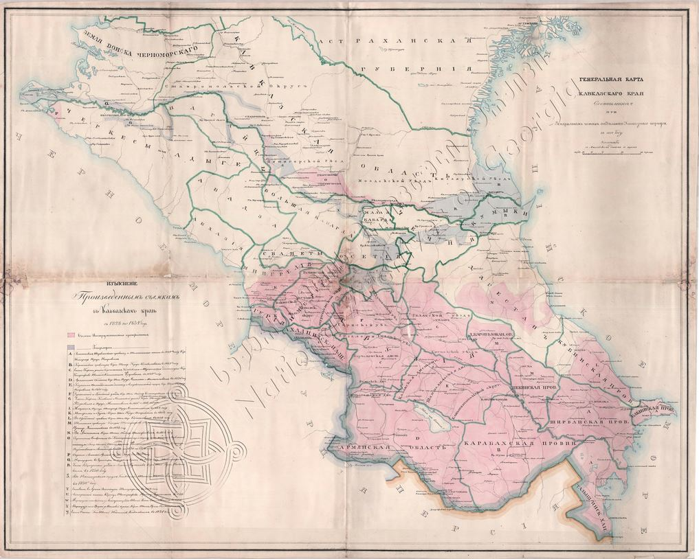 Генеральная Карта Кавказскаго края составленная при Генеральном штабе отдельнаго Кавказскаго корпуса в 1837 году